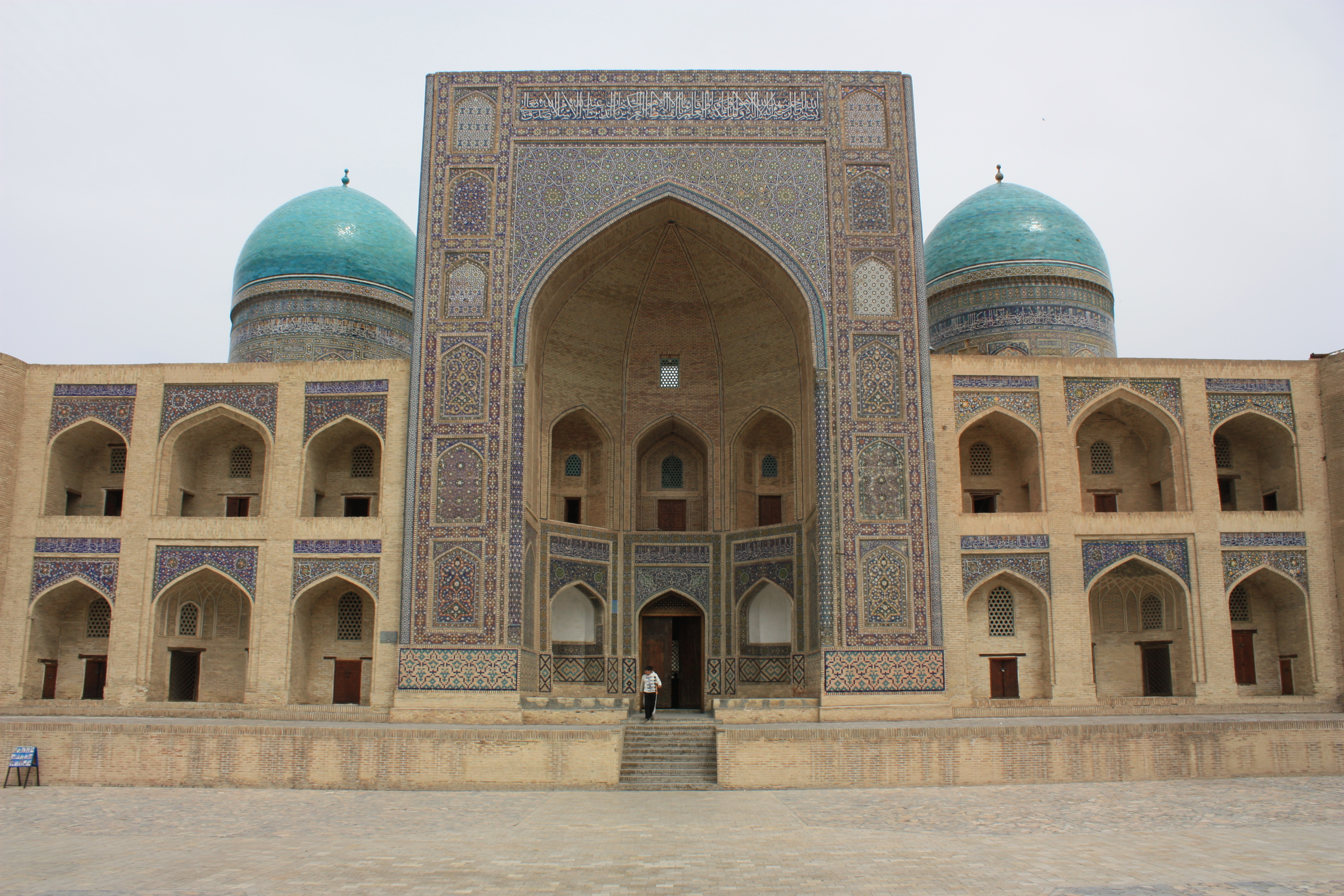 Bukhara, Mir-i-Arab Medressa